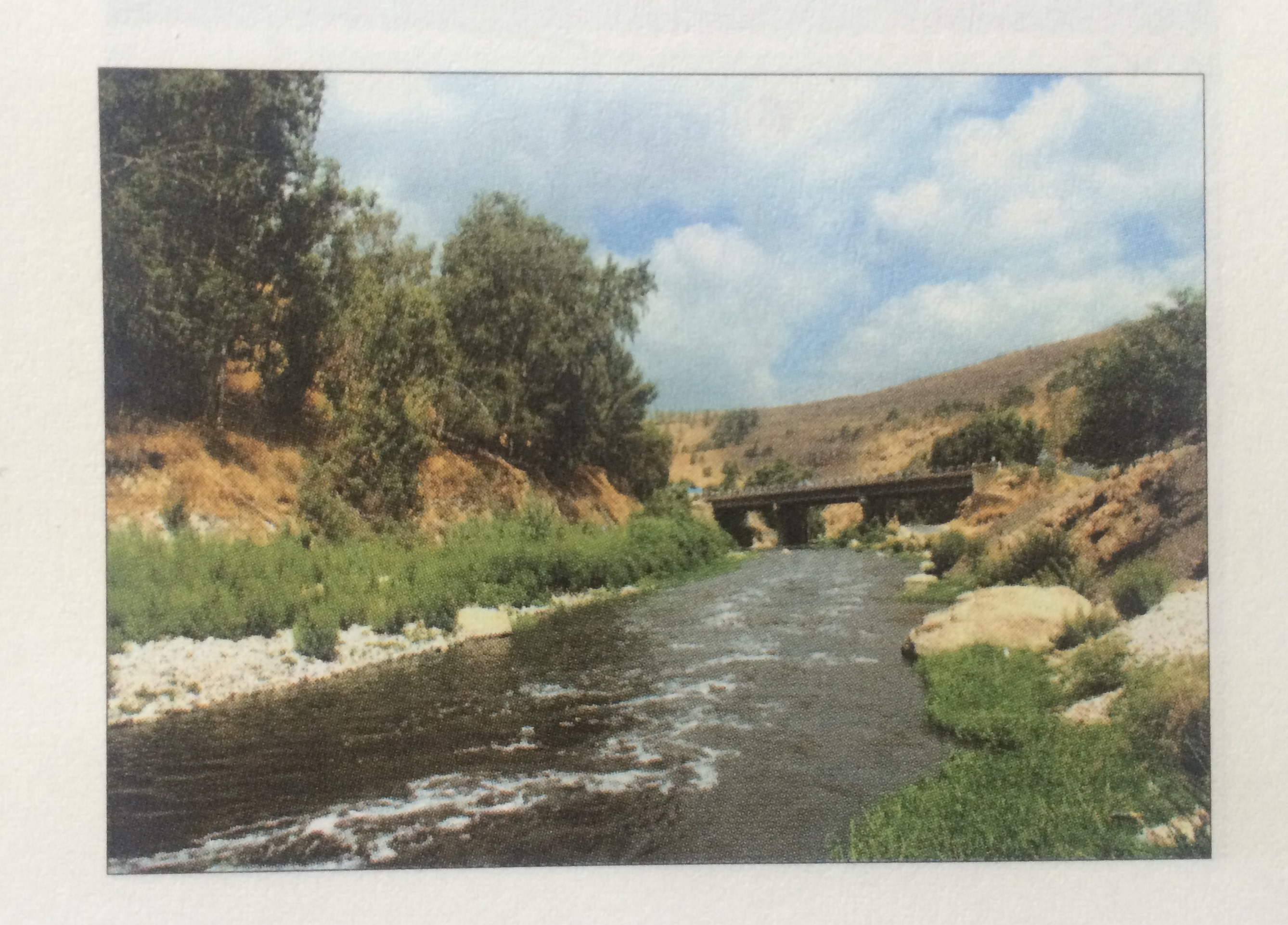 얍복강의 모습 (출처 : GPS성경지명사전, 홍순화)